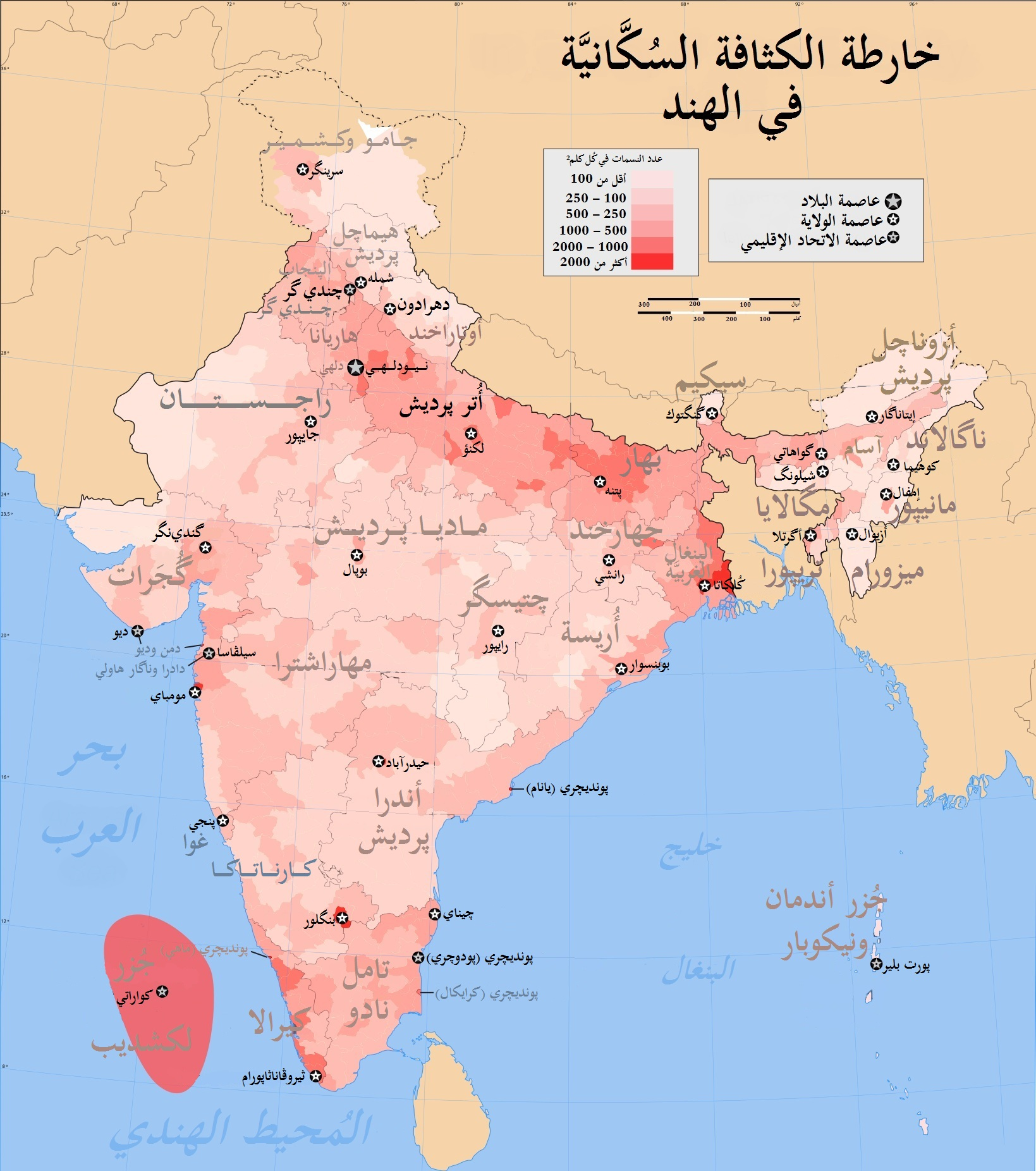 خارطة تُبِّينُ الكثافة السُكَّانيَّة في الهند حسب الولاية، وفق إحصاءٍ صدر سنة 2001م.